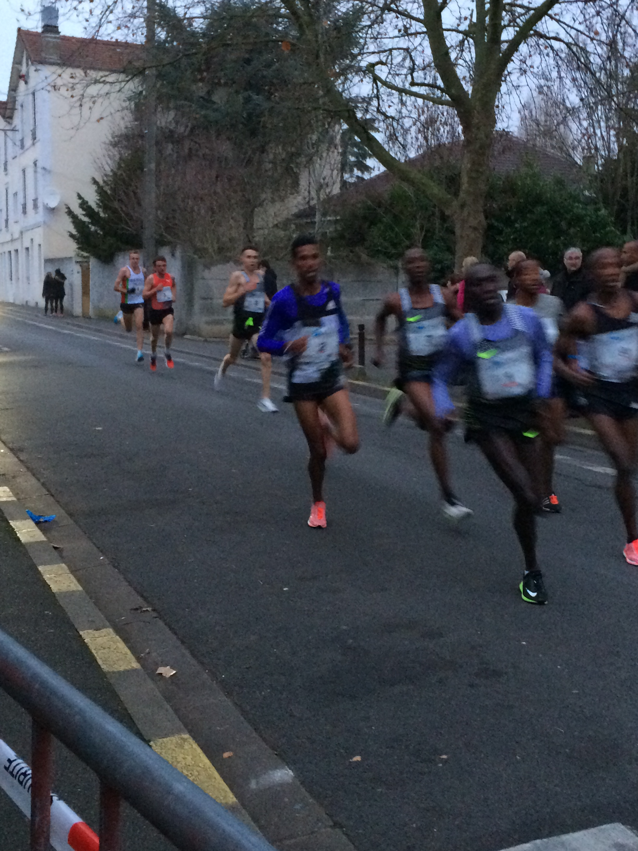 La course des as dans les rues de Houilles